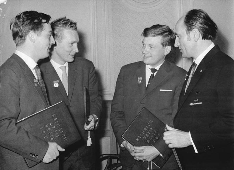 Berlin, Verleihung Heinrich-Greif-Preis Zentralbild-Junge 13.5.1961 Heinrich-Greif-Preis 1961 verliehen Den Heinrich-Greif-Preis, der alljährlich für hervorragende Einzel- und kollektivleistungen auf dem Gebiet der Filmkunst vergeben wird, verlieh der Stellvertreter des Ministers für Kultur Professor Hans Rodenberg, am 13.5.1961 im Ministerium für Kultur an zwei Künstlerkollektive und den Regiesseur eines Zeichentrickfilms. UBz: Mit dem Greif-Preis I. Klasse wurden der Regisseur Frank Beyer, der Komponist Joachim Werzlau, der Kameramann Günter Marczinkowsky und der Architekt Alfred Hirschmeier für den Film "Fünf Patronenhülsen" ausgezeichnet. Abgebildete Personen: Beyer, Frank: Regisseur, DDR (PND 119217899) Werzlau, Joachim: Komponist, Mitglied der Akademie der Künste (AdK), Nationalpreis 1967, Goethe-Preis 1984, DDR Marczinkowsky, Günter: Kameramann bei der DEFA, DDR Hirschmeier, Alfred: Architekt, Heinrich-Greif-Preis 1961, DDR